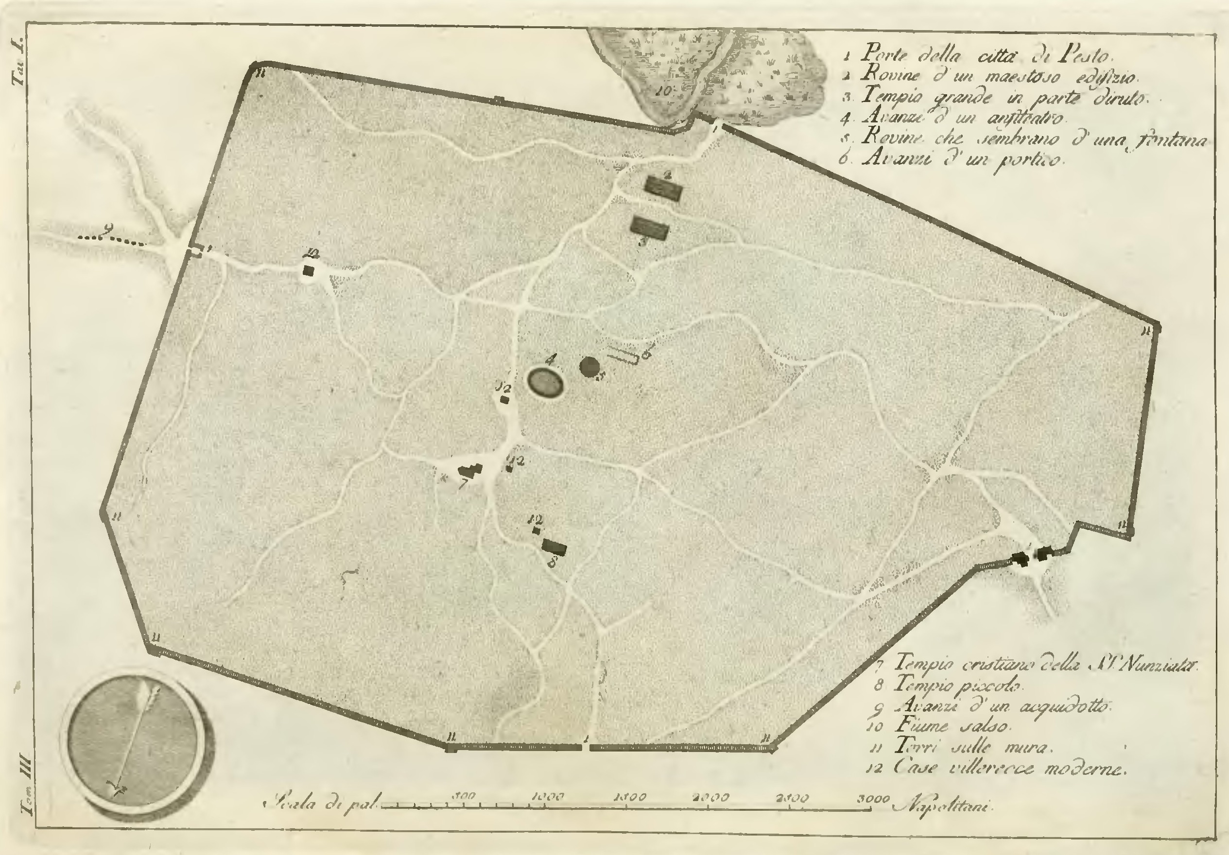 Johann Joachim Winckelmann: "Storia delle arti del disegno", traduzione di Carlo Fea da: Geschichte der Kunst des Alterthums (Wien, 1764/1776)